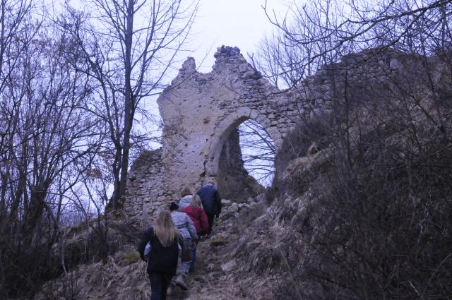 Das ehemalige Schlosstor von Lutzmannstein im Truppenübungsplatzes Hohenfels im Jahr 2011